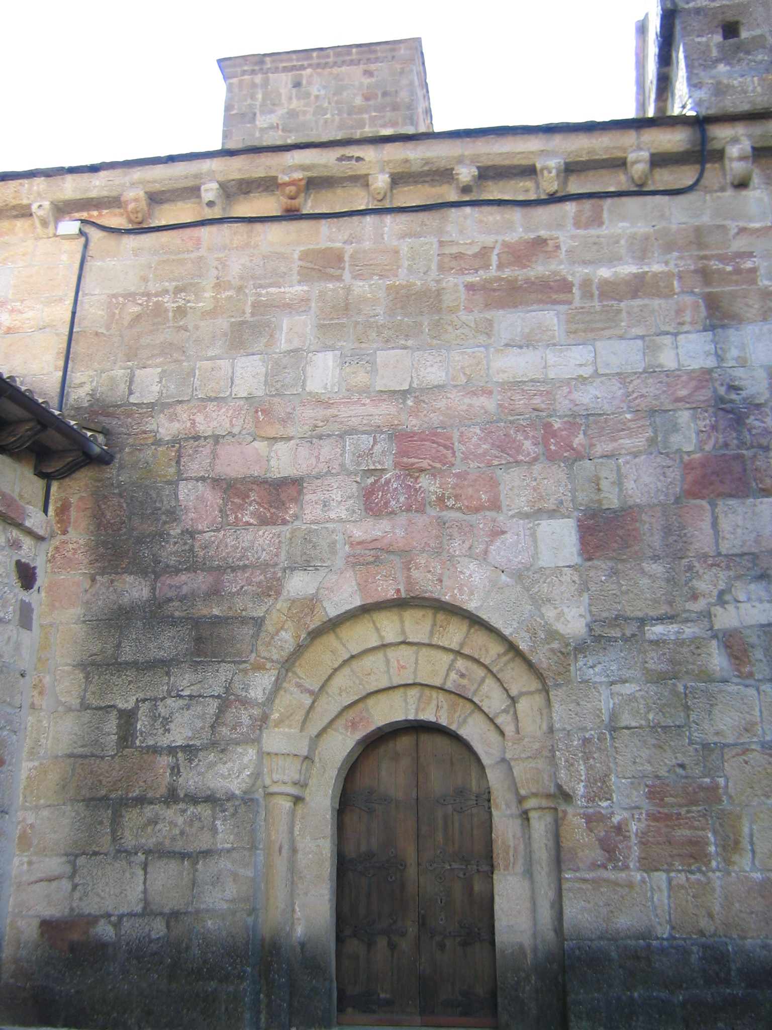 Monasterio de Leyre, puerta lateral, Yesa, Navarra (España).